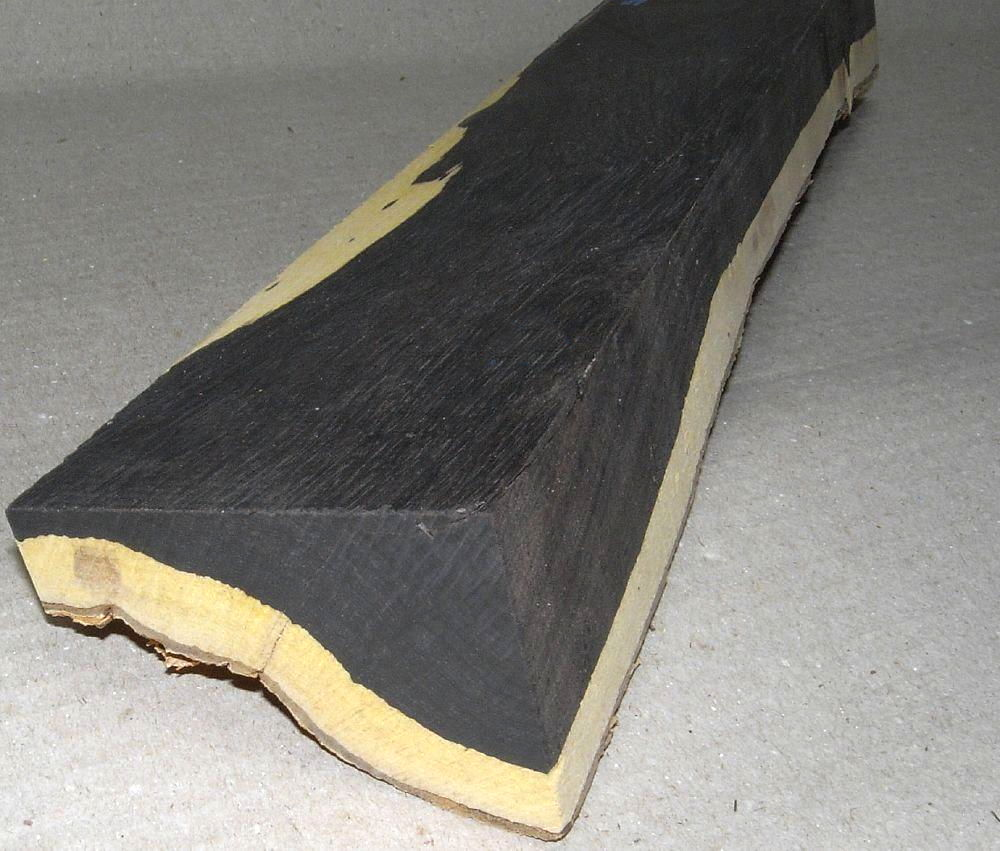 Grenadil, African Blackwood